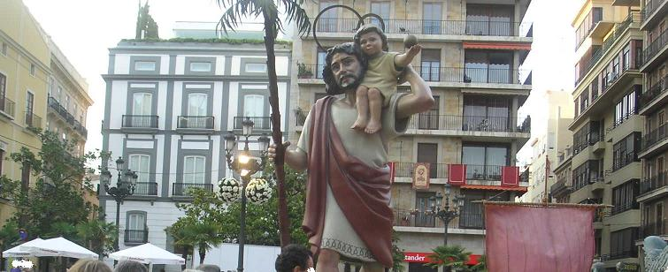 San Cristóbal en la procesión del Corpus de Valencia